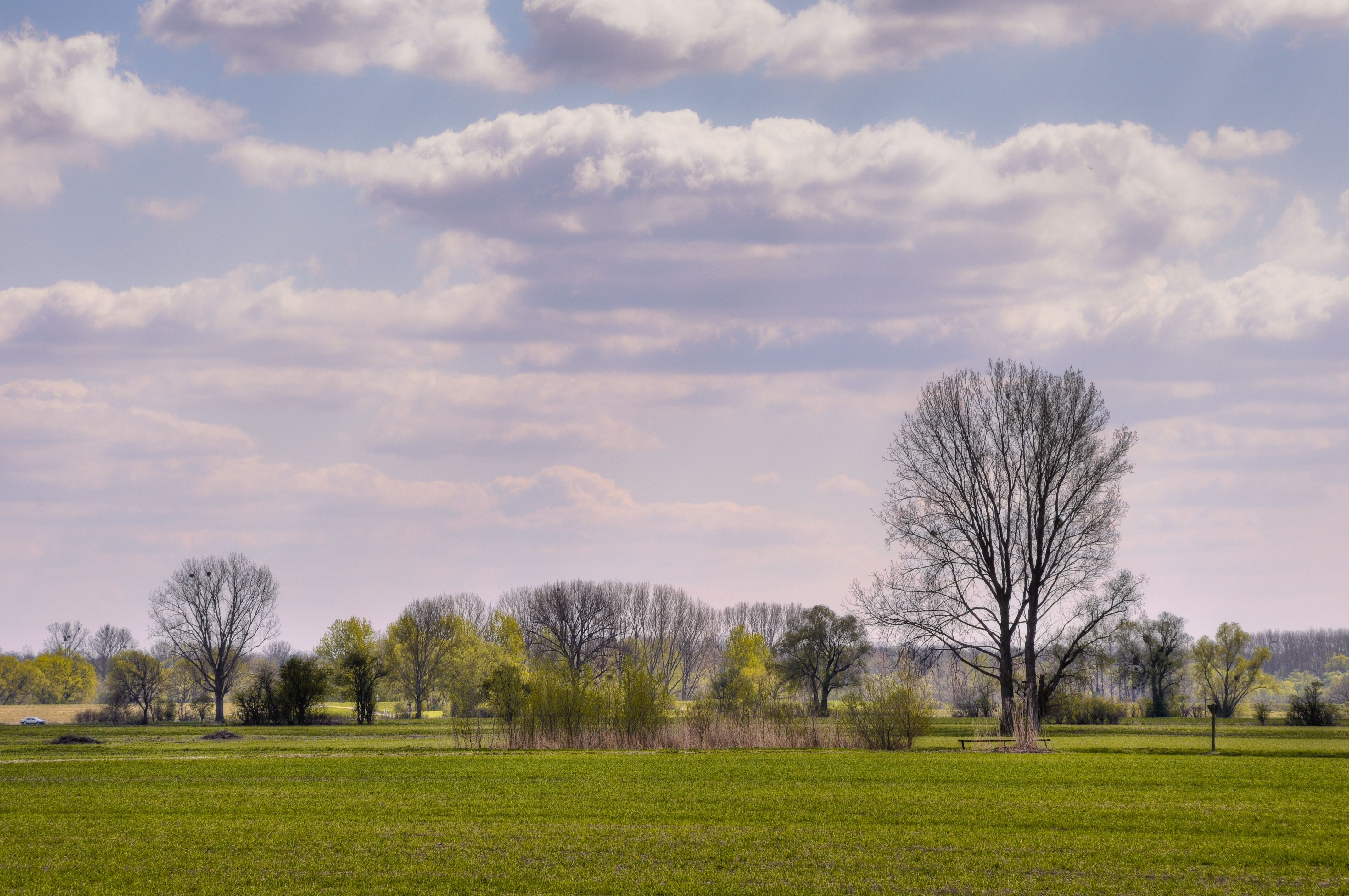 Elisabeth Langgässer´s Weg durch das Ried: Ich beschreibe hier die Weite und Offenheit dieses Naturschutzgebietes und die großartigen Himmel, die man hier wegen des niedrigen Horizontes im vollen Umfang präsentiert bekommt. Sorgfältig sind die Kompositionen der Horizontlinie mithilfe der einzelnen Bäume gestaltet, um zu zeigen, wie die Landschaftsgärtner hier ein malerisches Bühnenbild geschaffen haben, das auch den Wildtieren zugute kommt.